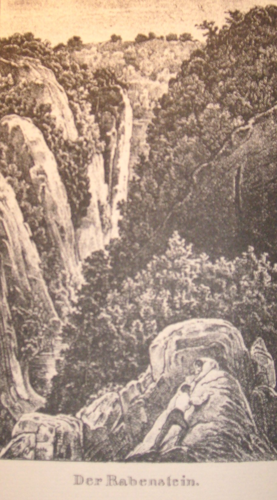 Der Rabenstein im Neandertal 1835 - Blick nach Südosten. Die beiden Kletterer im Vordergrund erklimmen vermutlich den „Neanderstuhl“ oberhalb der Neanderhöhle. Der Rabenstein wird der letzte Felsen links im Bildhintergrund sein.